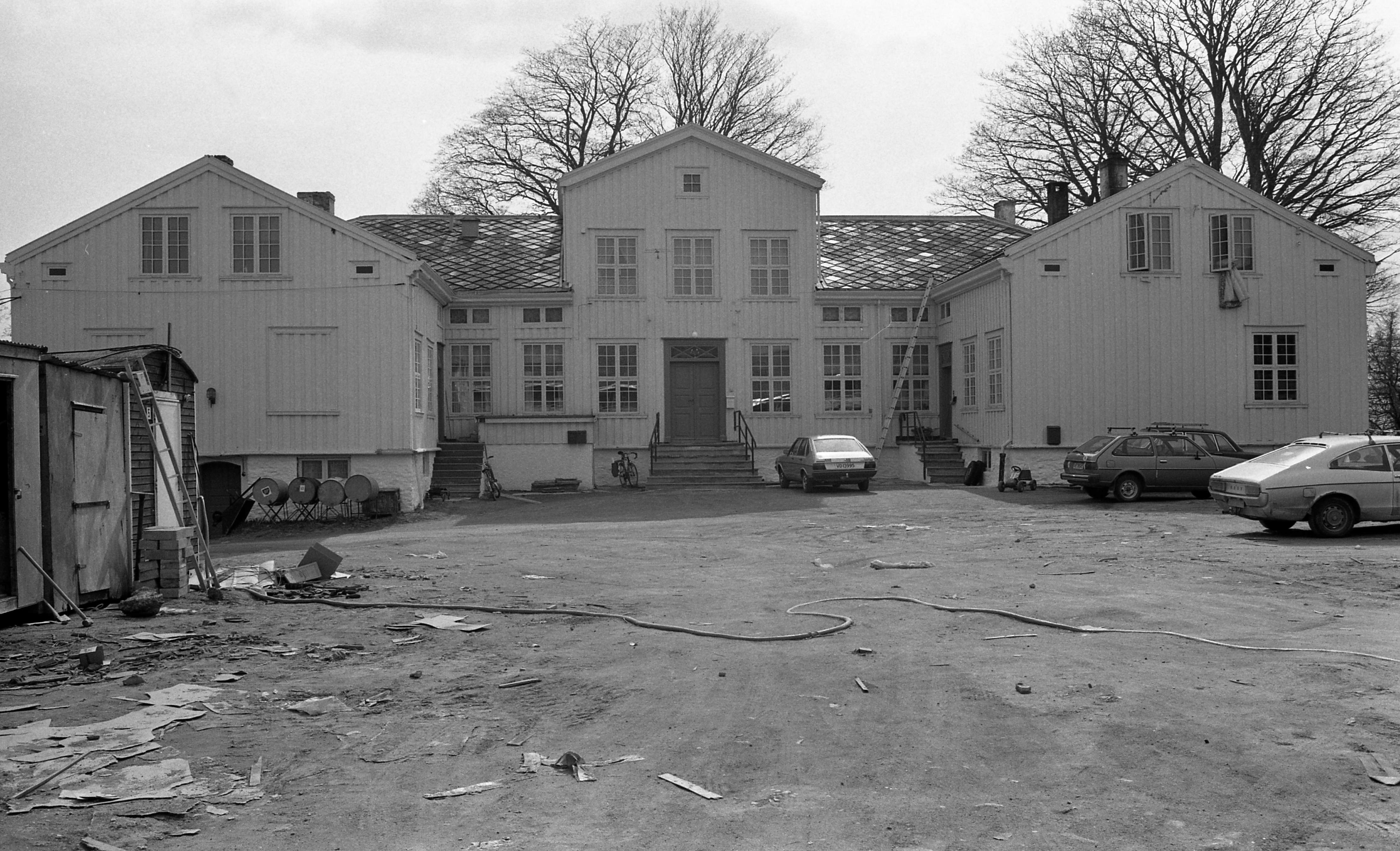 Format: 35 mm sort/hvitt Film: Agfapan 100 Dato / Date: Mai 1983 Fotograf / Photographer: Morten Kerr Sted / Place: Lade, Trondheim Eier / Owner Institution: Trondheim byarkiv, The Municipal Archives of Trondheim Arkivreferanse / Archive reference: Tor.H43.P3.F12348, film 208 Merknad: Fra Byantikvarens negativsamling. Devle (norrønt Depill, kanskje navn på et tjern eller en dam som kan ha ligget på gårdsvaldet; i gammel tid var navnet Depill, et norrønt ord for et lite tjern, senere ble det Deffle, Dieffle, Deuell og Defle, før det ble skrevet slik vi kjenner det), gnr. 412/1 (tidl. gnr. 3 i Strinda), på Ladehalvøya mellom Ringve og Leangen. Gården ligger på en haug, som nabogården Ringve. Det er funnet en gravrøys på valdet, som opprinnelig sannsynligvis hørte under Lade, og det er umulig å si noe om når eiendommen ble et eget gårdsbruk. Devle tilhørte Bakke kloster i middelalderen og lå senere under setegården Lade og hadde samme eiere som denne inntil Caspar Schøllers død 1661. Sønnene Eiler Schøller og Christopher Schøller solgte gården til kjøpmann Jochum Hinsche, som igjen solgte den til kjøpmann Jonas Angell i 1708. Hans svigersønn Just Wide fikk overdratt gården 1737, og Wides svigersønn Henrik Meincke overtok gården i 1784. Hans sønn Just Wide Meincke var neste eier, som 1840 overlot gården til sønnen Henrik Meincke. Ved Henriks død 1855 overtok søsteren Louise Meincke, og etter henne overtok sønnen Just Wide Meincke Finne. Ved hans død overtok svigerdatteren Anna Kathrine Finne f. Lindemann, og etter henne overtok sønnen Just Wide Meincke Finne. Gården ble solgt til Trondheim kommune i 1962. Kilde: Trondheim Byleksikon (Oslo 2008) s. 134 For mer utfyllende gårdshistorikk, se Strinda Historielag: WikiStrinda - Devle